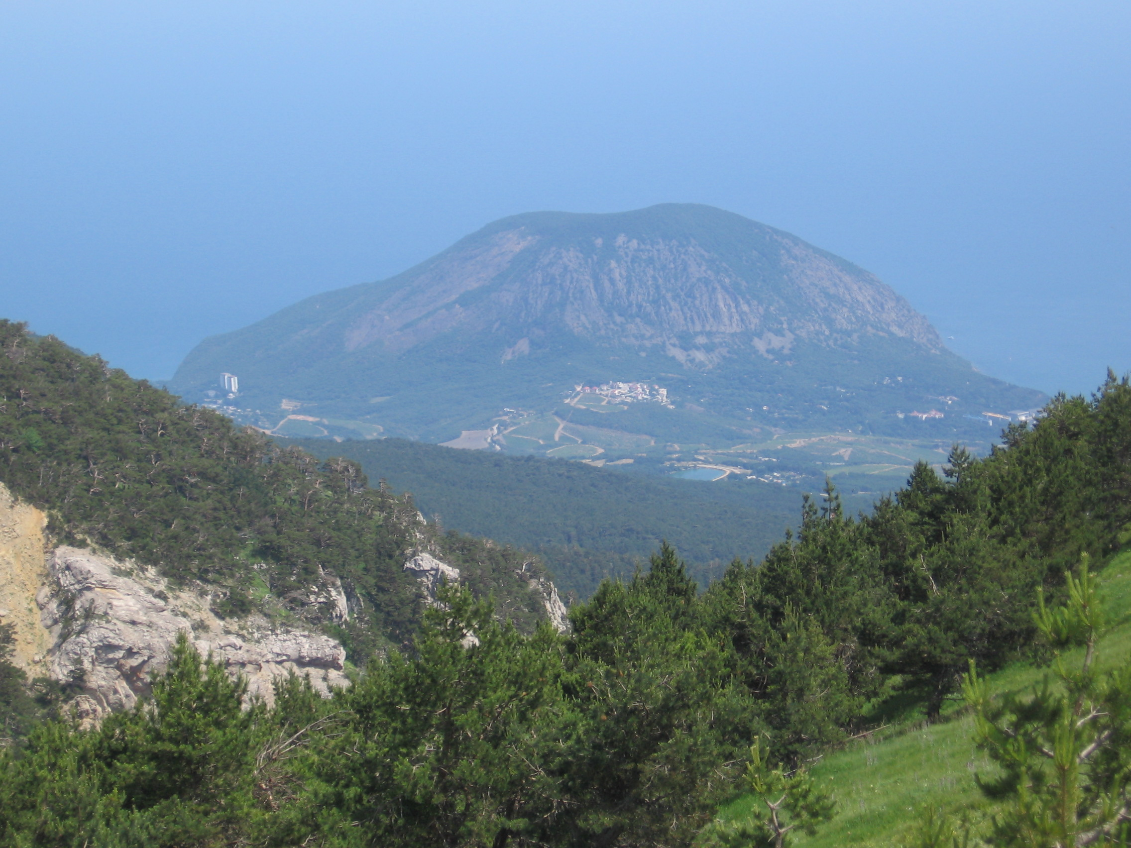 Аю-Даг